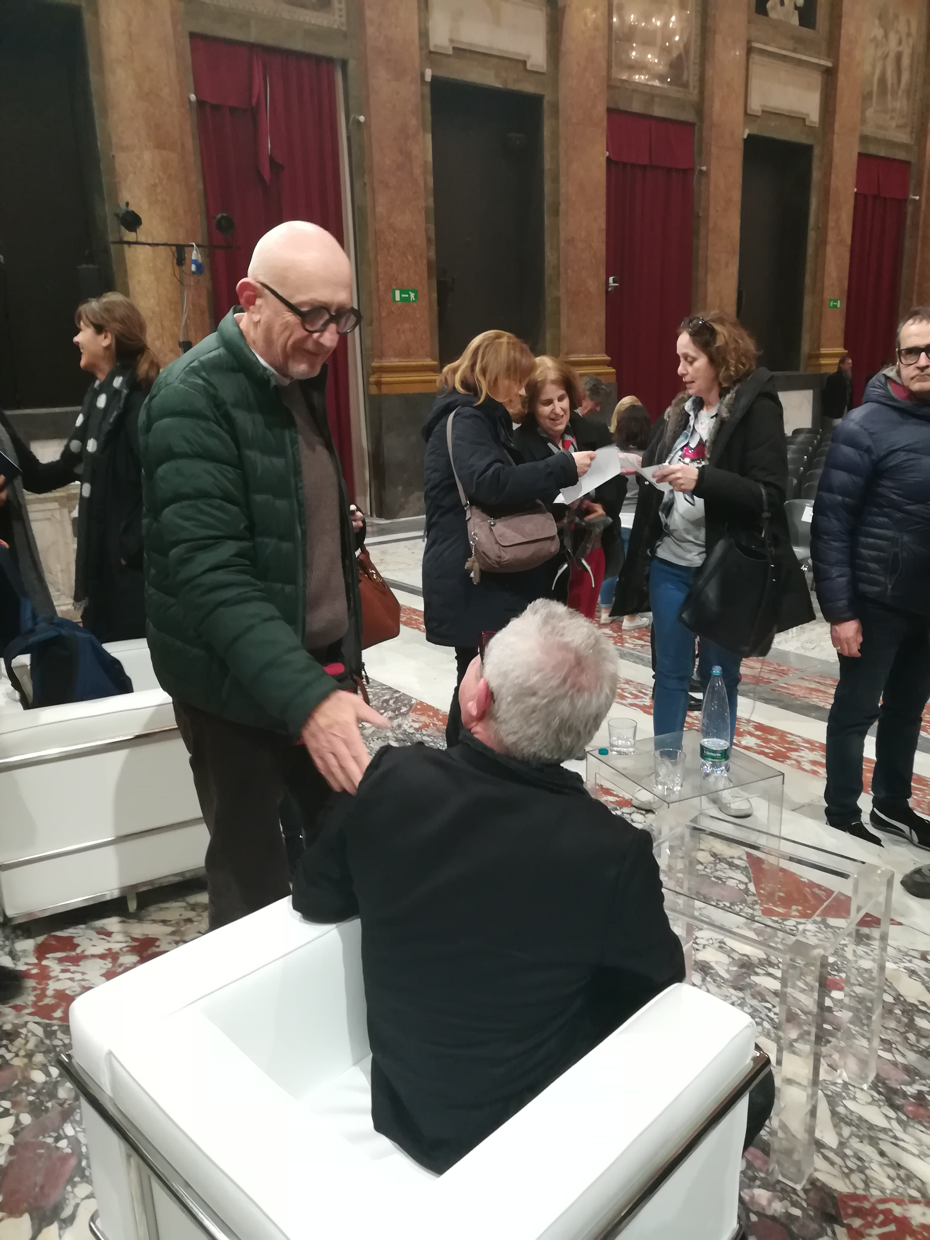 Daniel Libeskind